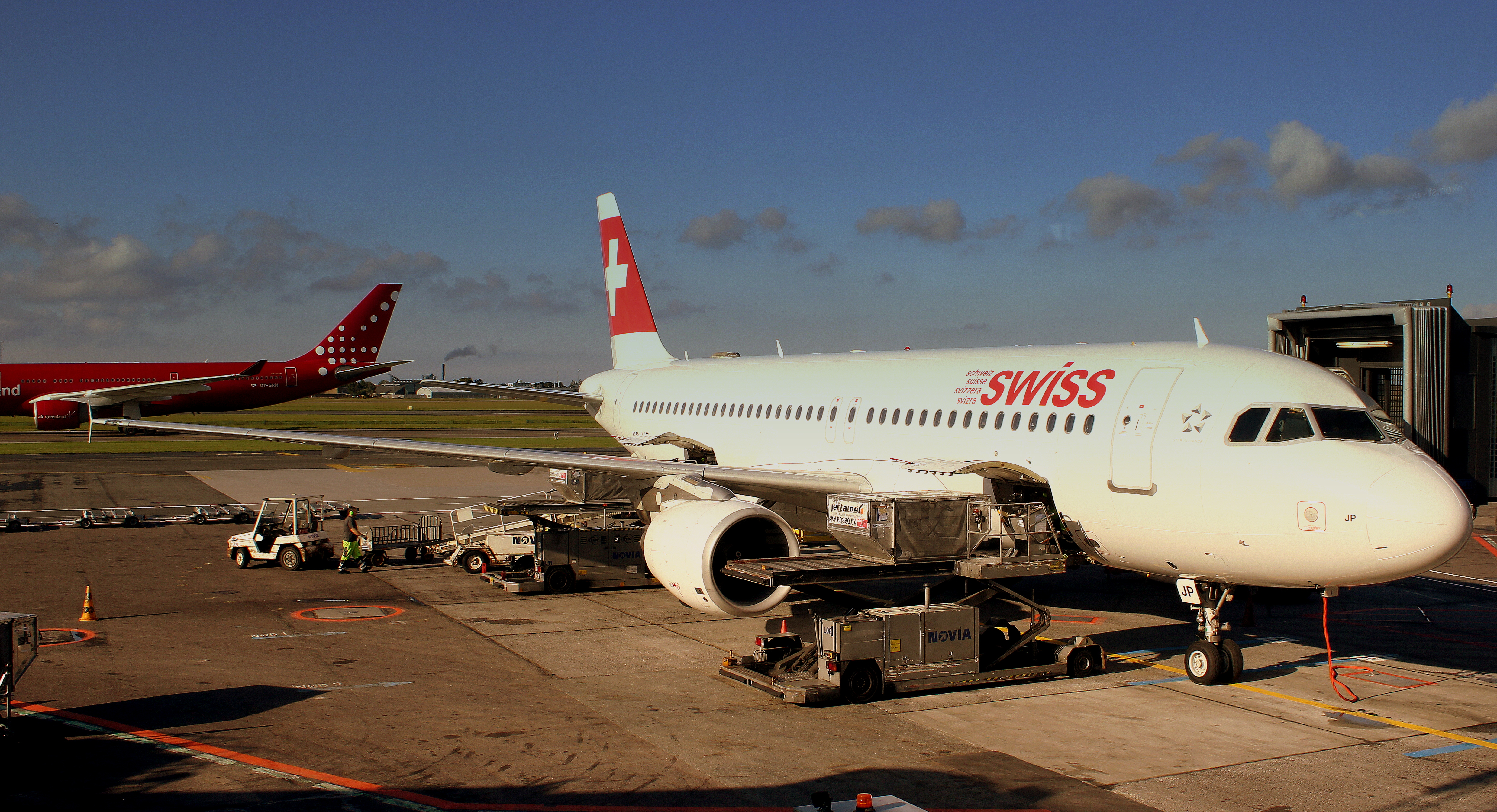 SWISS AIRBUS A320 AT COPENHAGEN KASTRUP AIRPORT DENMARK SEP 2013